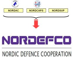 NORDAC + NORDCAPS + NORDSUP = NORDEFCO